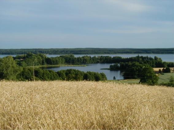 Lubie lake, view from hills next to the Lubieszewo village, Zachodniopomorskie, Poland